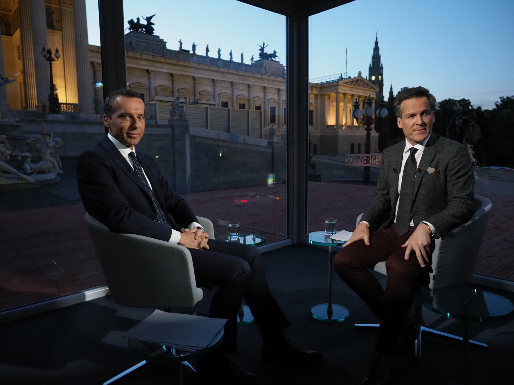 Am 4. September war Bundeskanzler Christian Kern zu Gast im "ORF-Sommergespräch" (Foto: SPÖ/Zach-Kiesling).